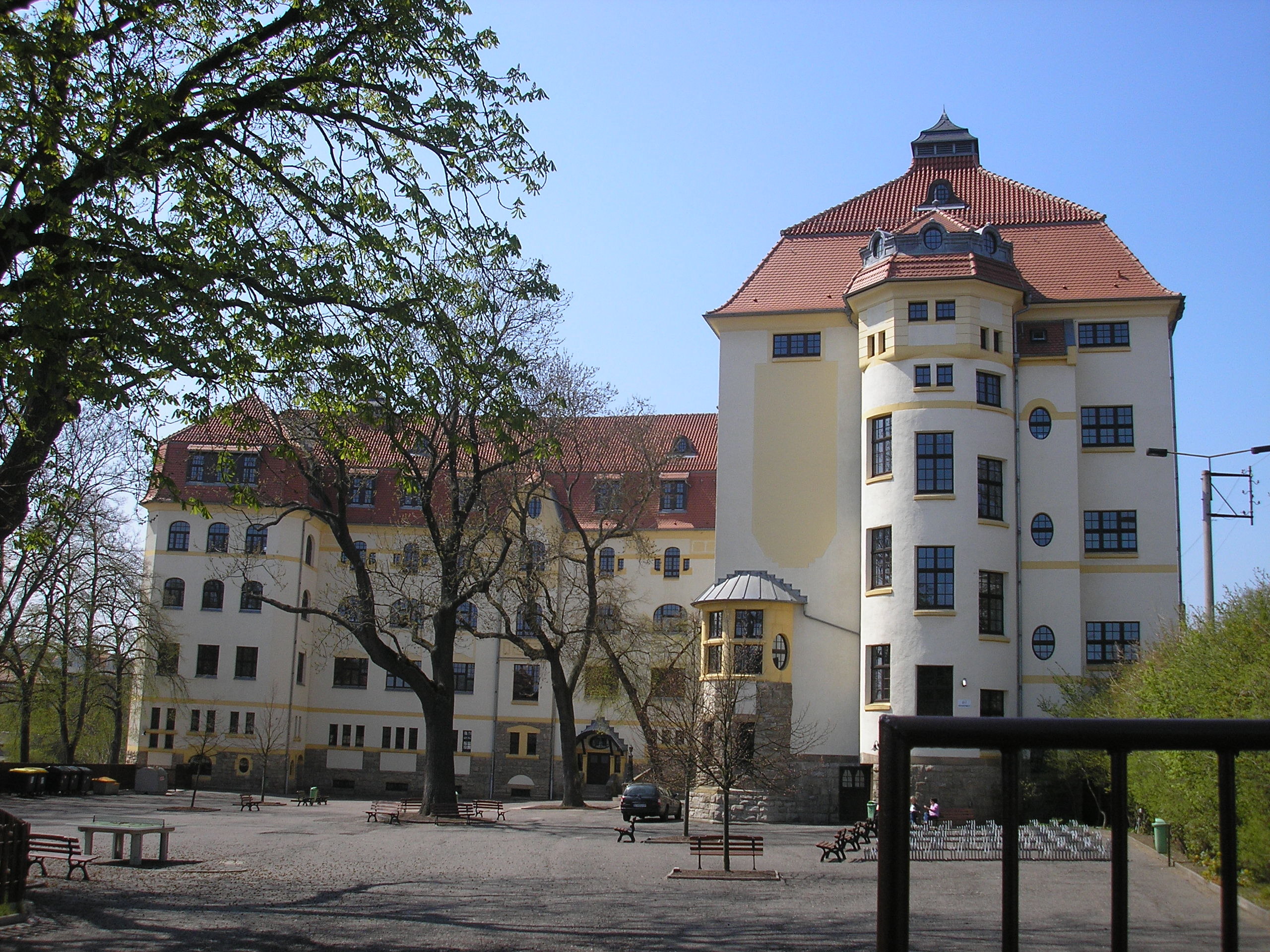 Die Arnoldischule in Gotha (Thüringen).